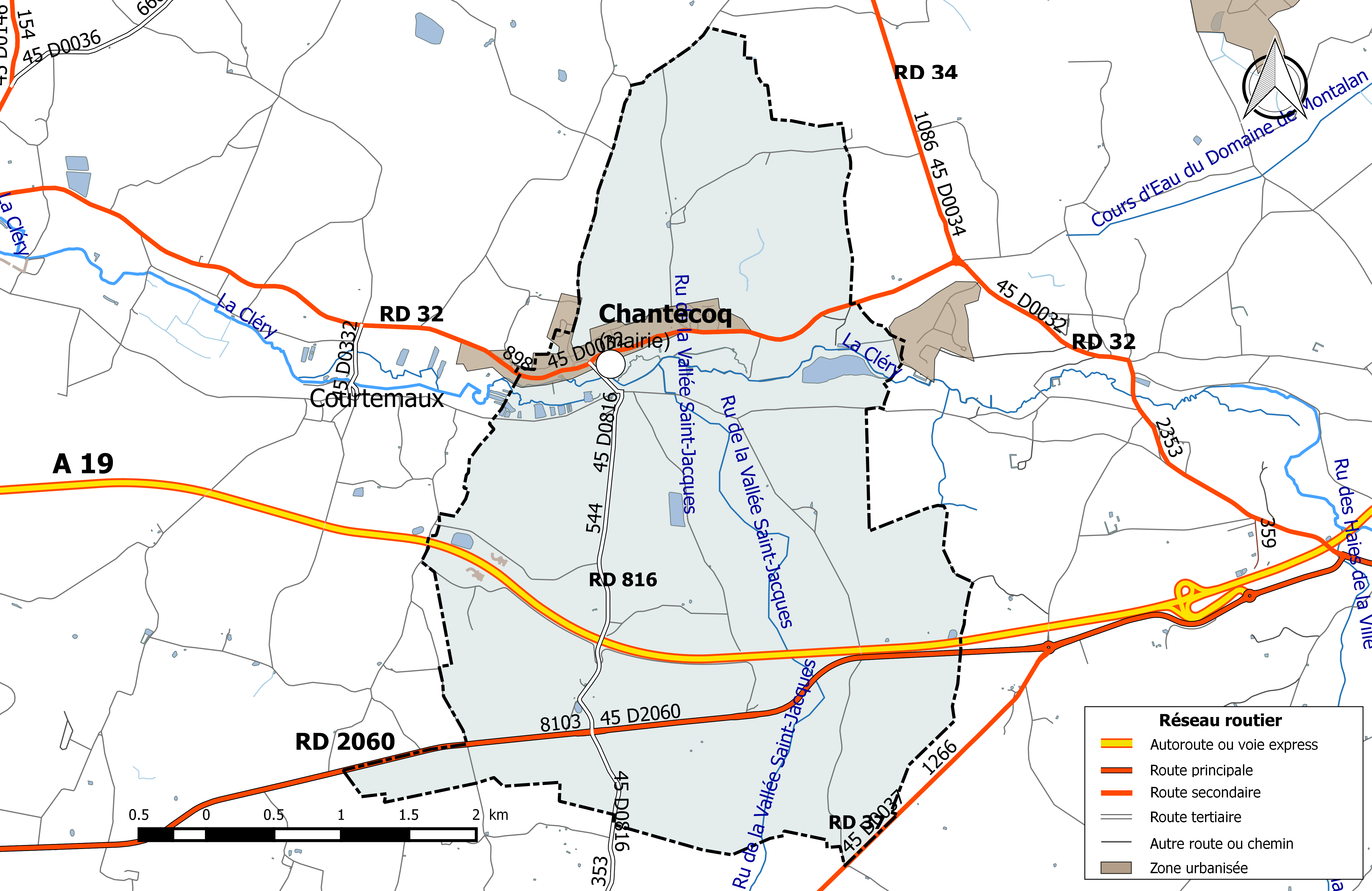 Carte du réseau routier de la commune de Chantecoq.